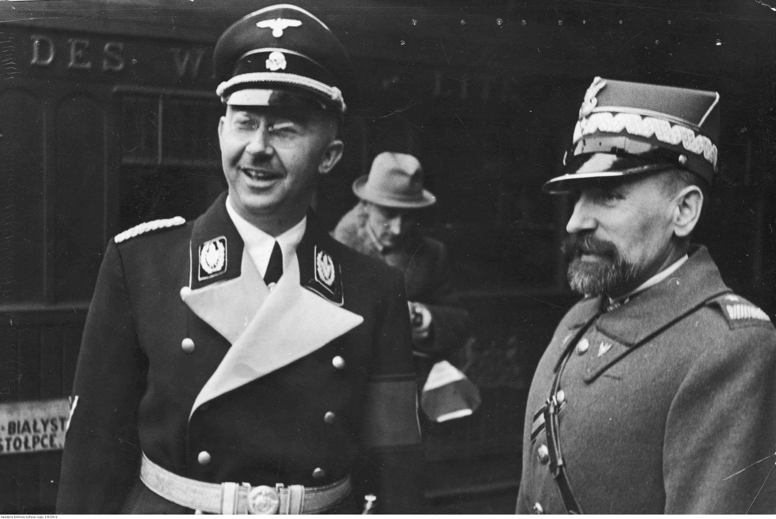 Heinrich Himmler i Kordian Zamorski w 1939 w Warsawie